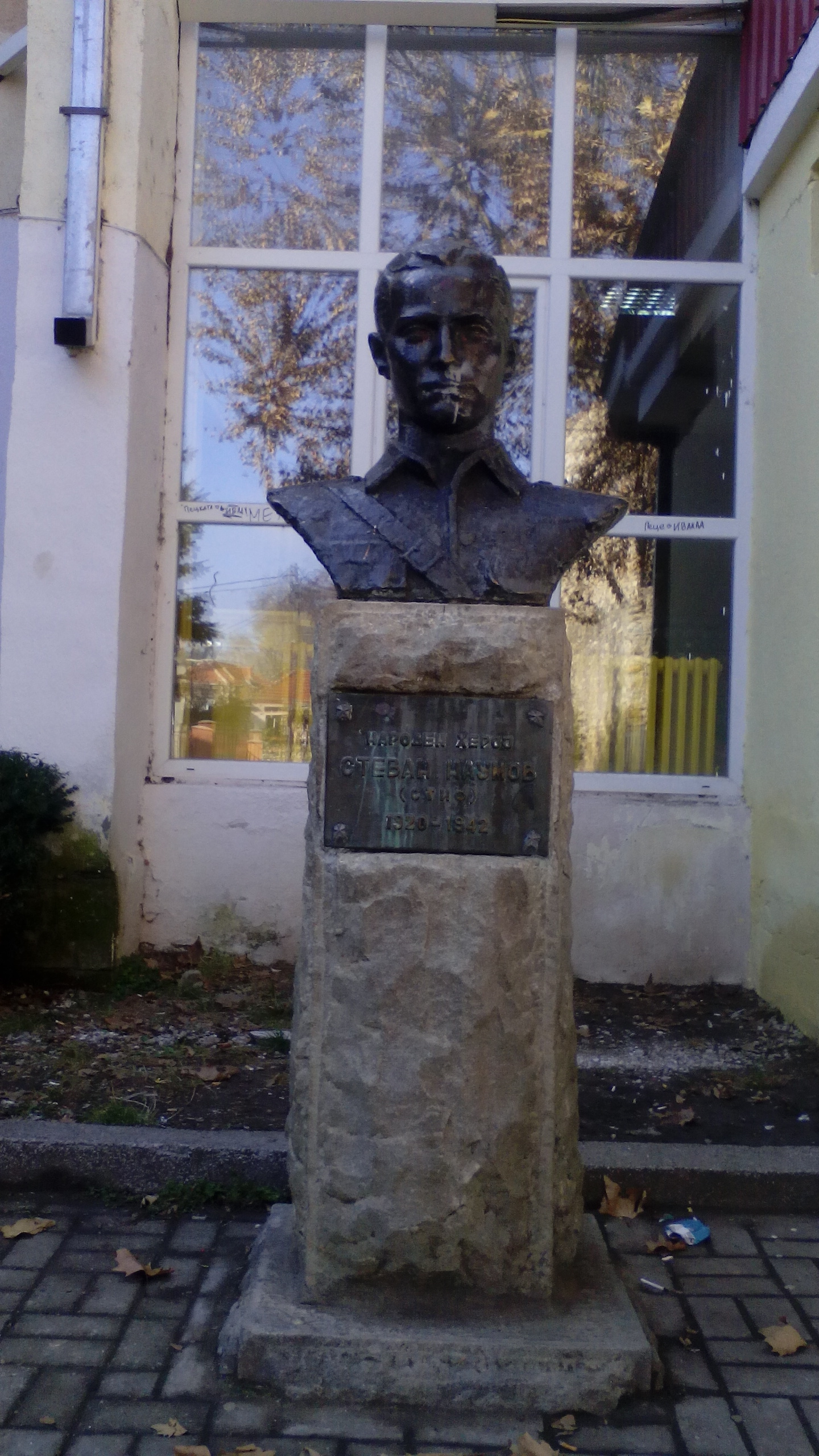 Биста на Стив Наумов во основното училиште што го носи неговото име во Битола